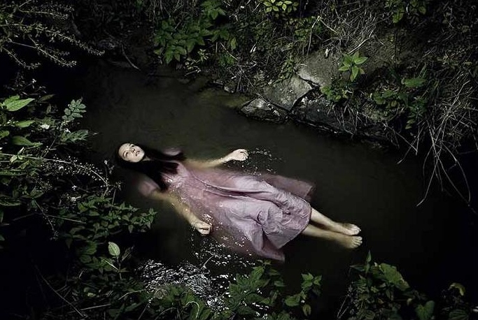 Jan Faukner